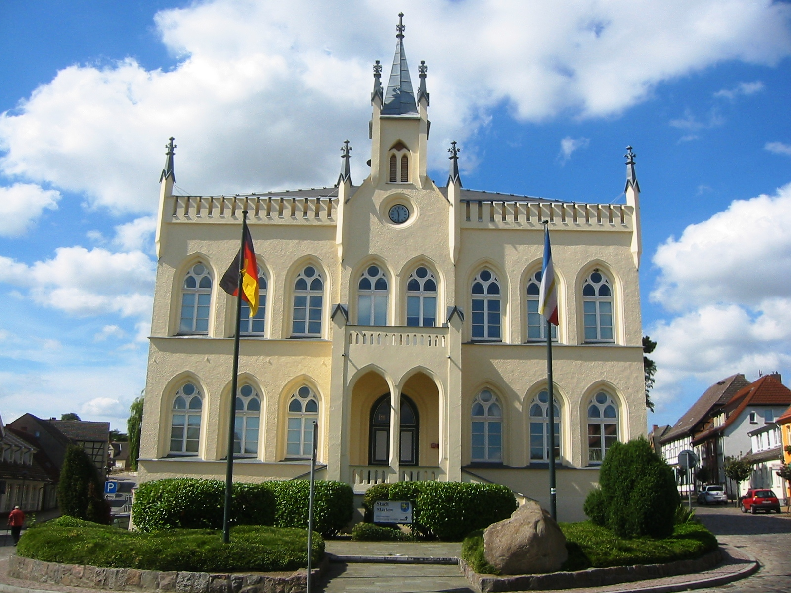 Marlower Rathaus